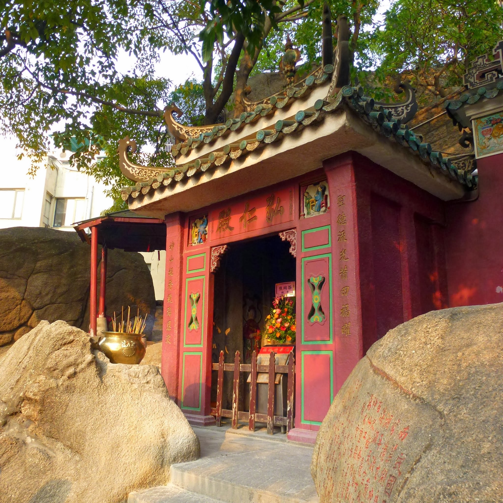 A-Ma Temple, Macau